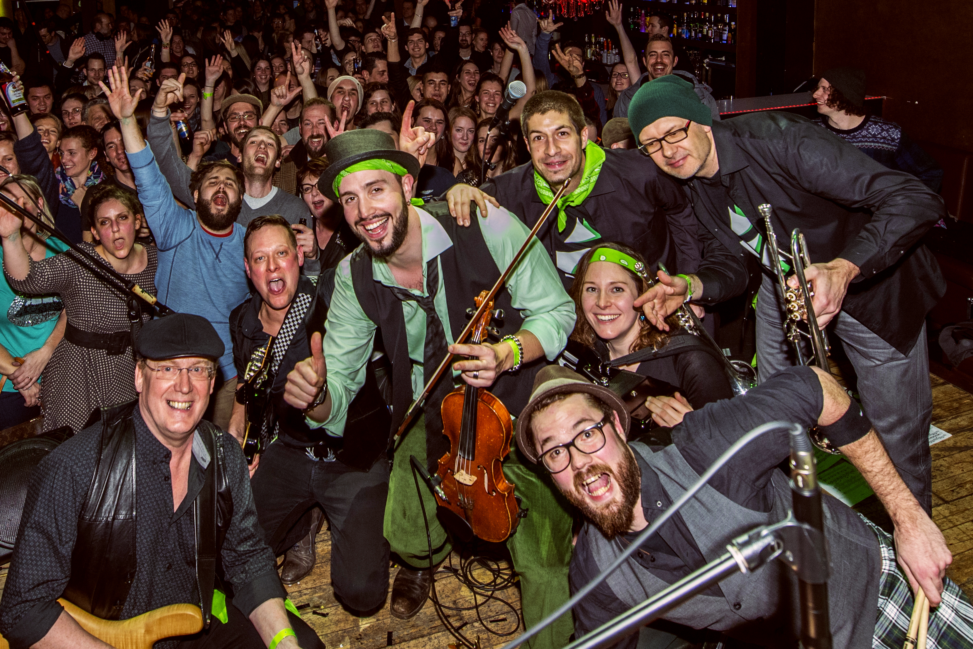 All in at Melusina